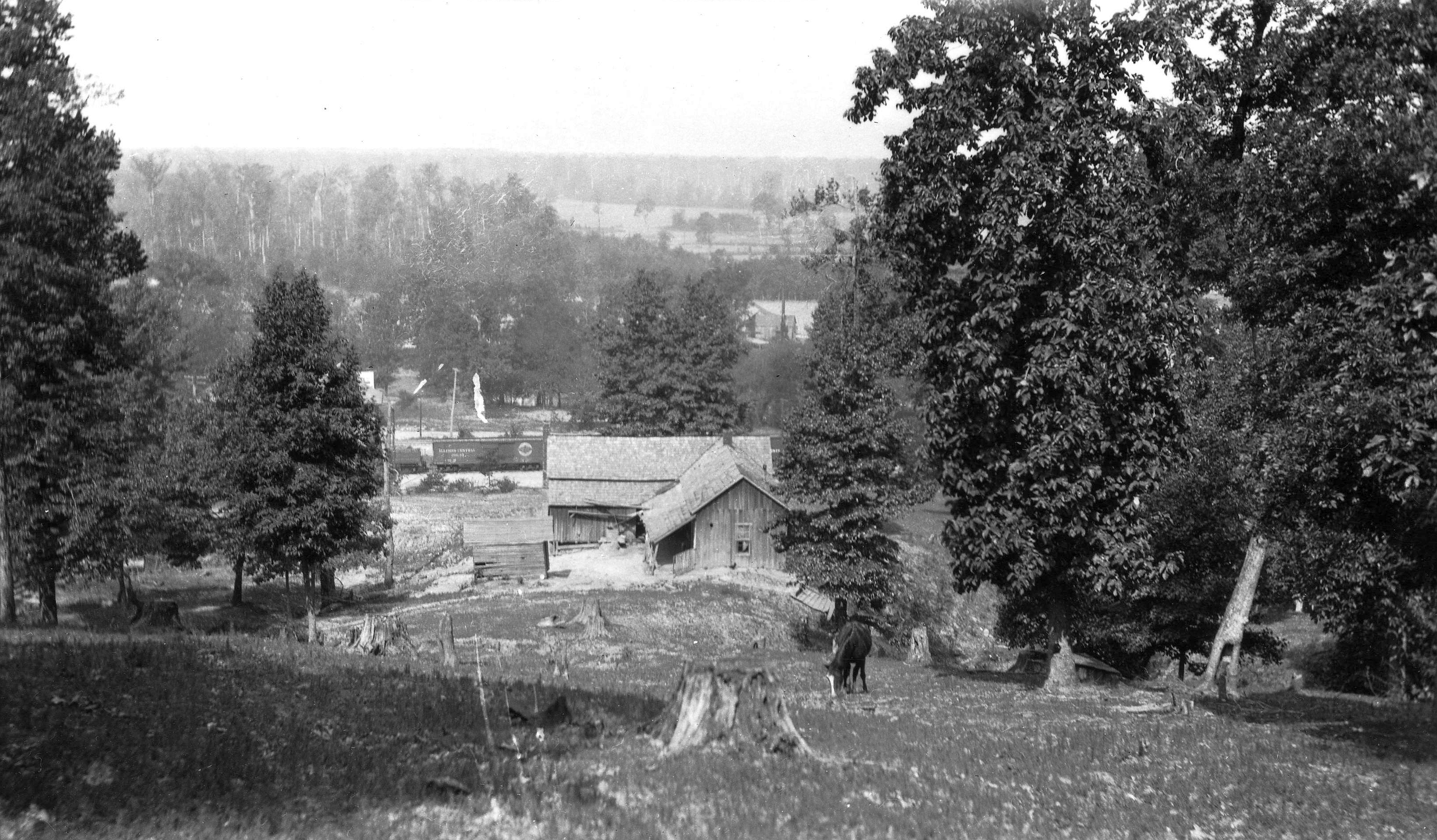 Sarah, Mississippi.